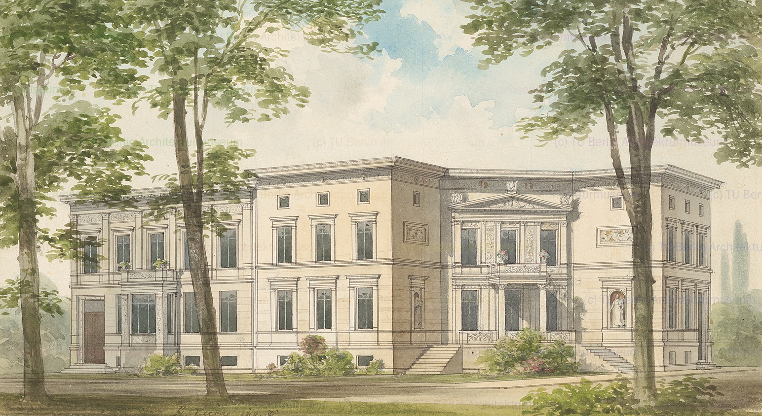 "Villa Joachim", Wohnhaus für den Musiker Joseph Joachim in Berlin-Tiergarten, Beethovenstraße 3 / In den Zelten; erbaut 1871-1872 nach Entwurf des Berliner Architekten Richard Lucae; nicht erhalten (Straßen aufgelassen, Lage etwa zwischen Bundeskanzleramt und "Haus der Kulturen der Welt")